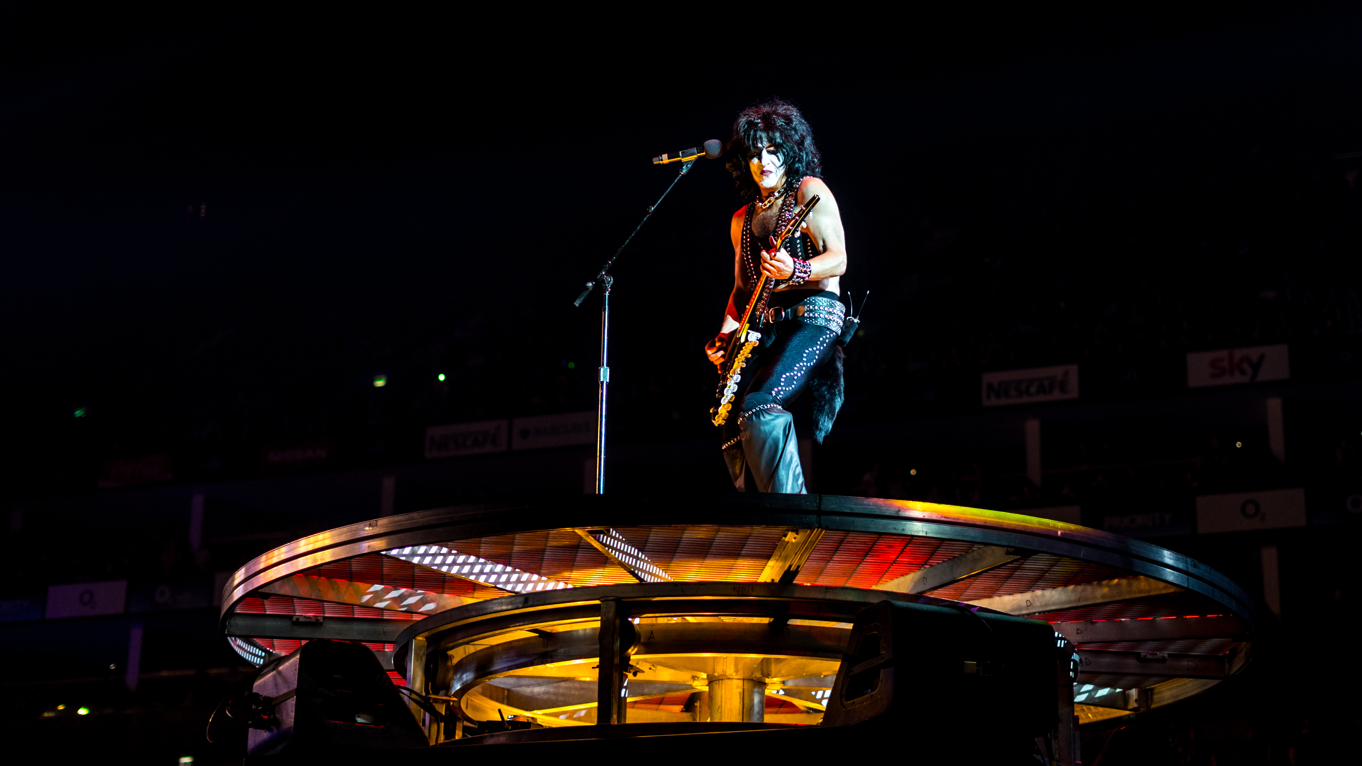 KissO2310517-34